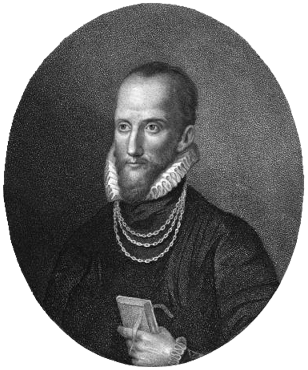 Humphrey Llwyd